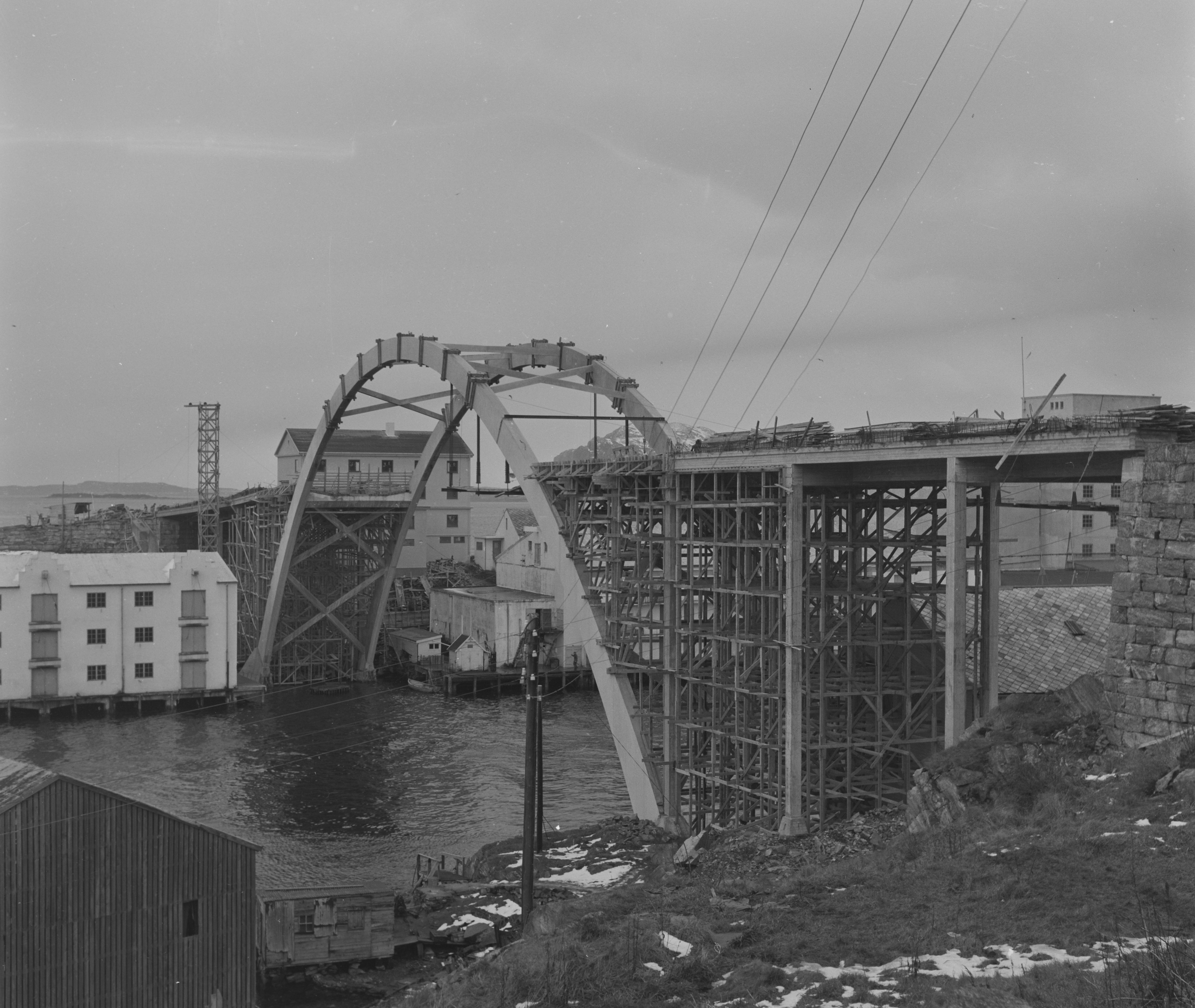 Bildet er hentet fra Arkivverket. Ålesunds nye bybro (Aspøy-Heissa) Arkivinstitusjon : Riksarkivet Arkivnavn : Billedbladet NÅ Sted : Norge, Møre og Romsdal, Ålesund, Emneord: Byggearbeider, Kommunikasjon, Bybro, Samferdsel, Bymiljø, Broer, Bruer Avbildet